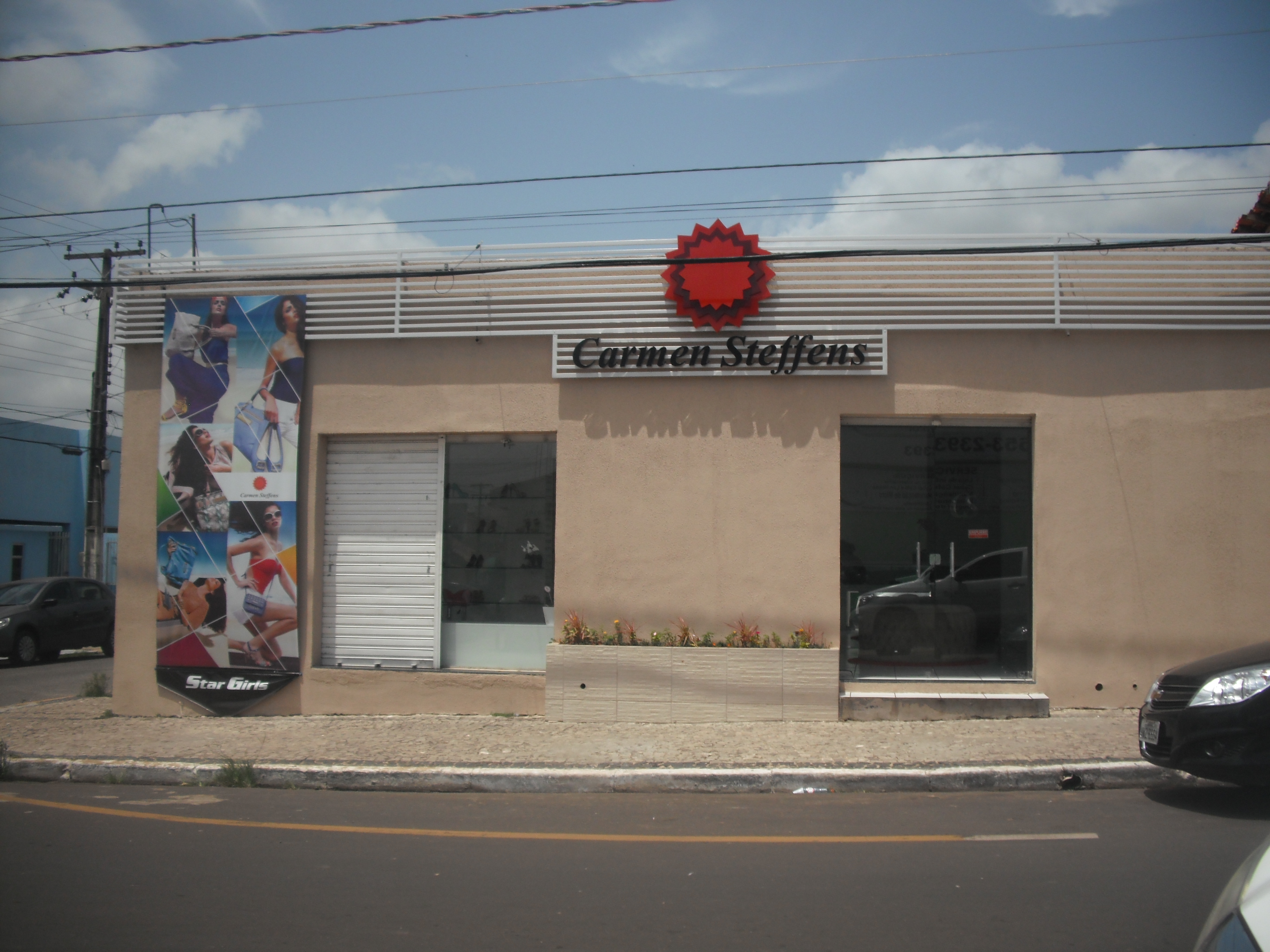 A franquia da Carmen Steffens de Santa Ines - MA